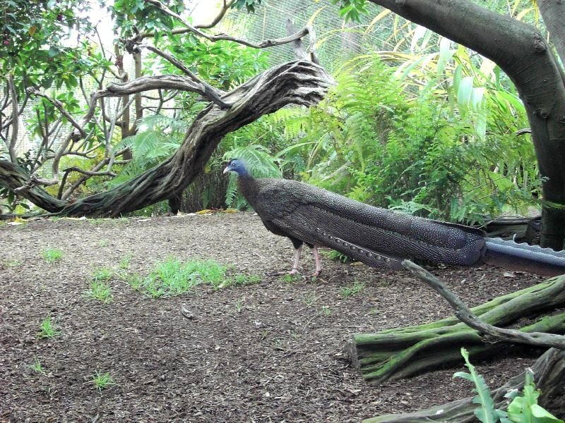 Digital StillCamera